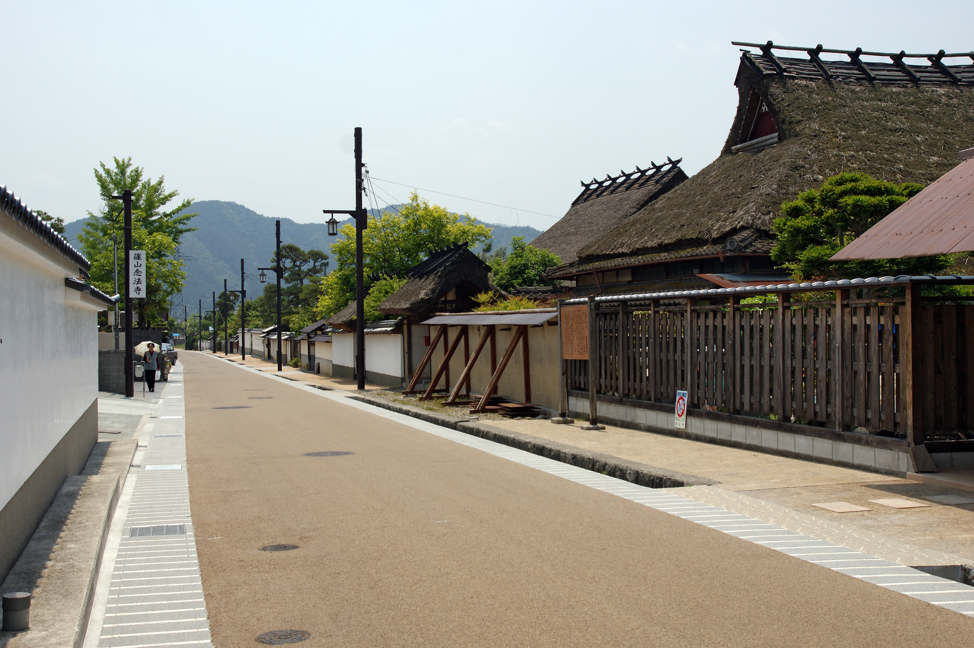 Okachi-machi in Sasayama, Hyogo prefecture, Japan